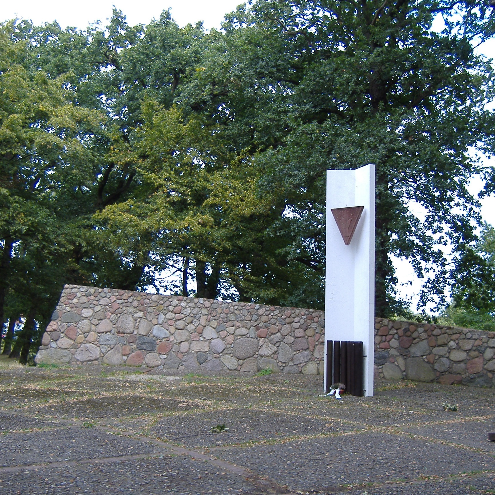 Gedenkstätte "Cap Arcona" in Schwarzen Busch auf der Insel Poel (Mecklenburg Vorpommern)This is a photograph of an architectural monument.It is on the list of cultural monuments of Poel